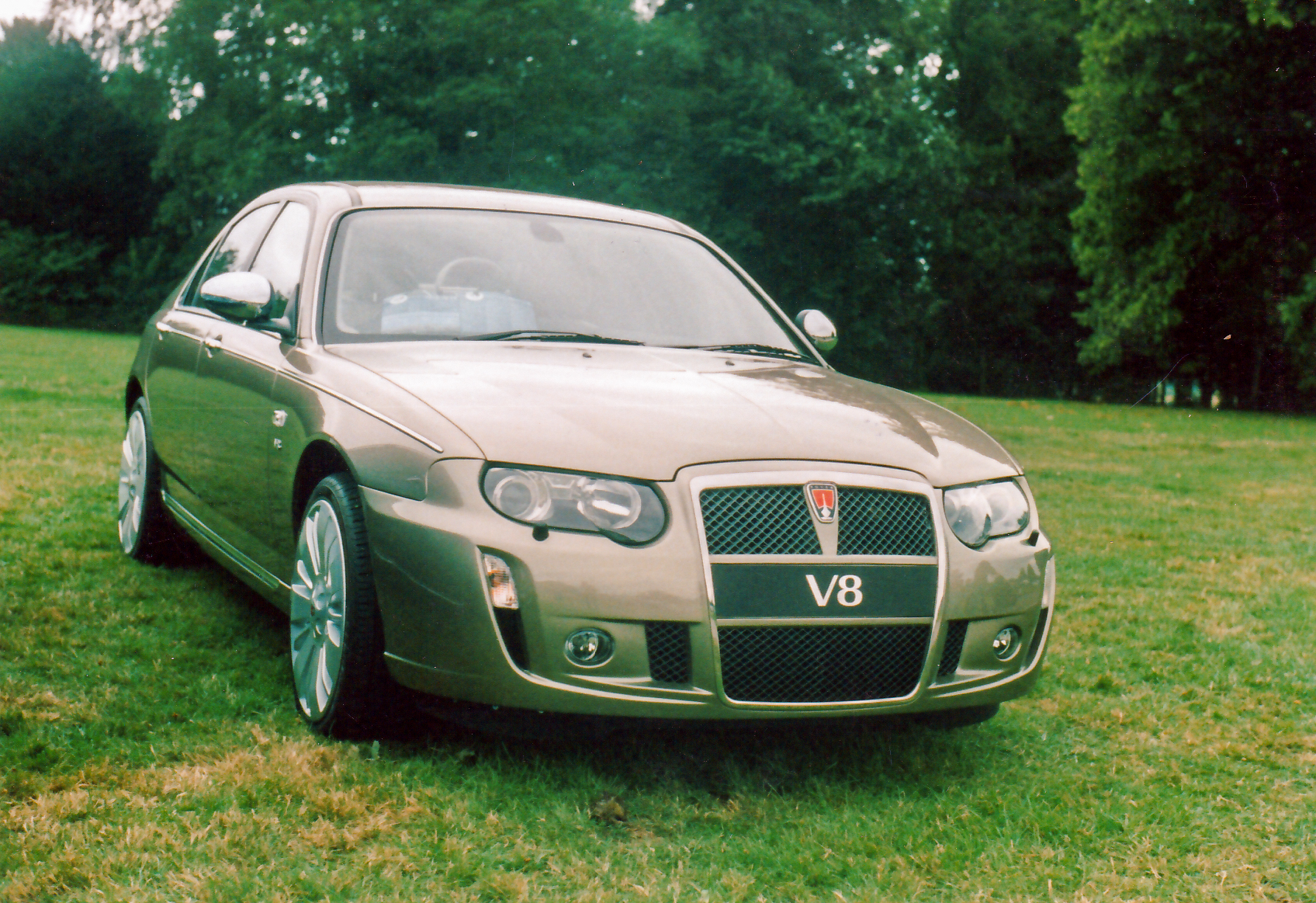 Pictured at Ragley Hall, 11th July 2004